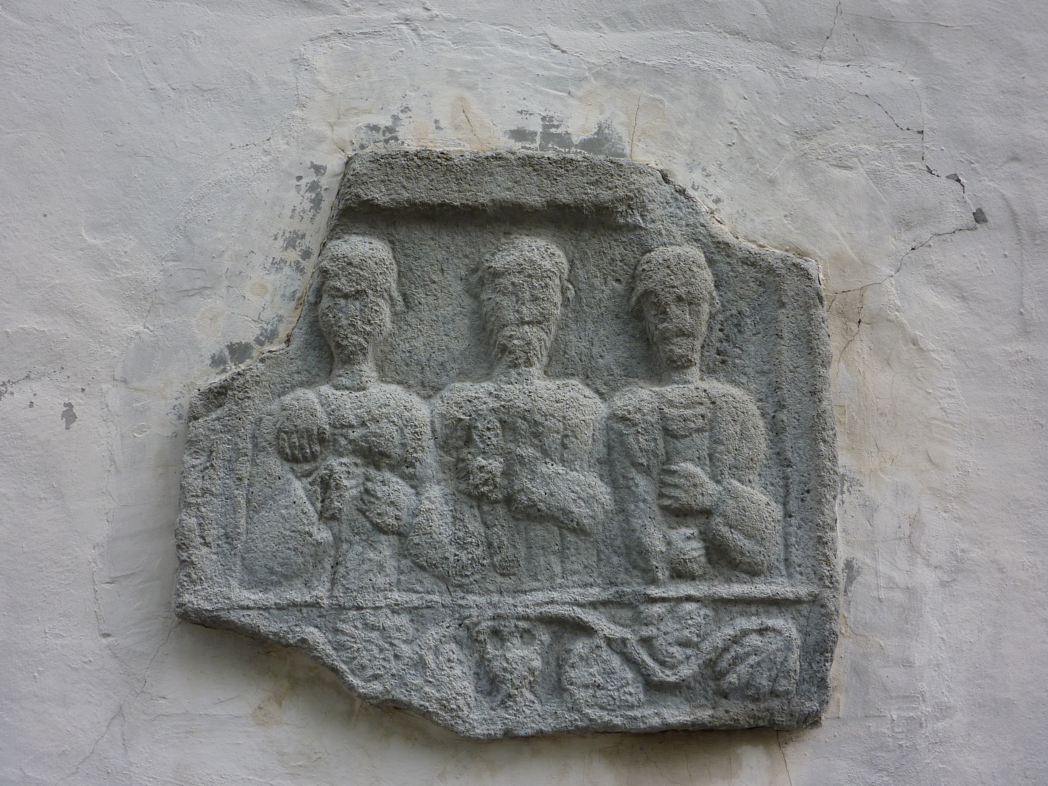 Spolie (Abguss) in der Westmauer der Pfarrkirche Markersdorf, Markersdorf-Haindorf, Niederösterreich